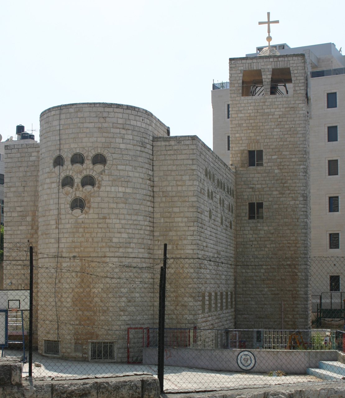 Kirche in Ramallah, Palästina. Object location31° 53′ 54″ N, 35° 12′ 07″ E )